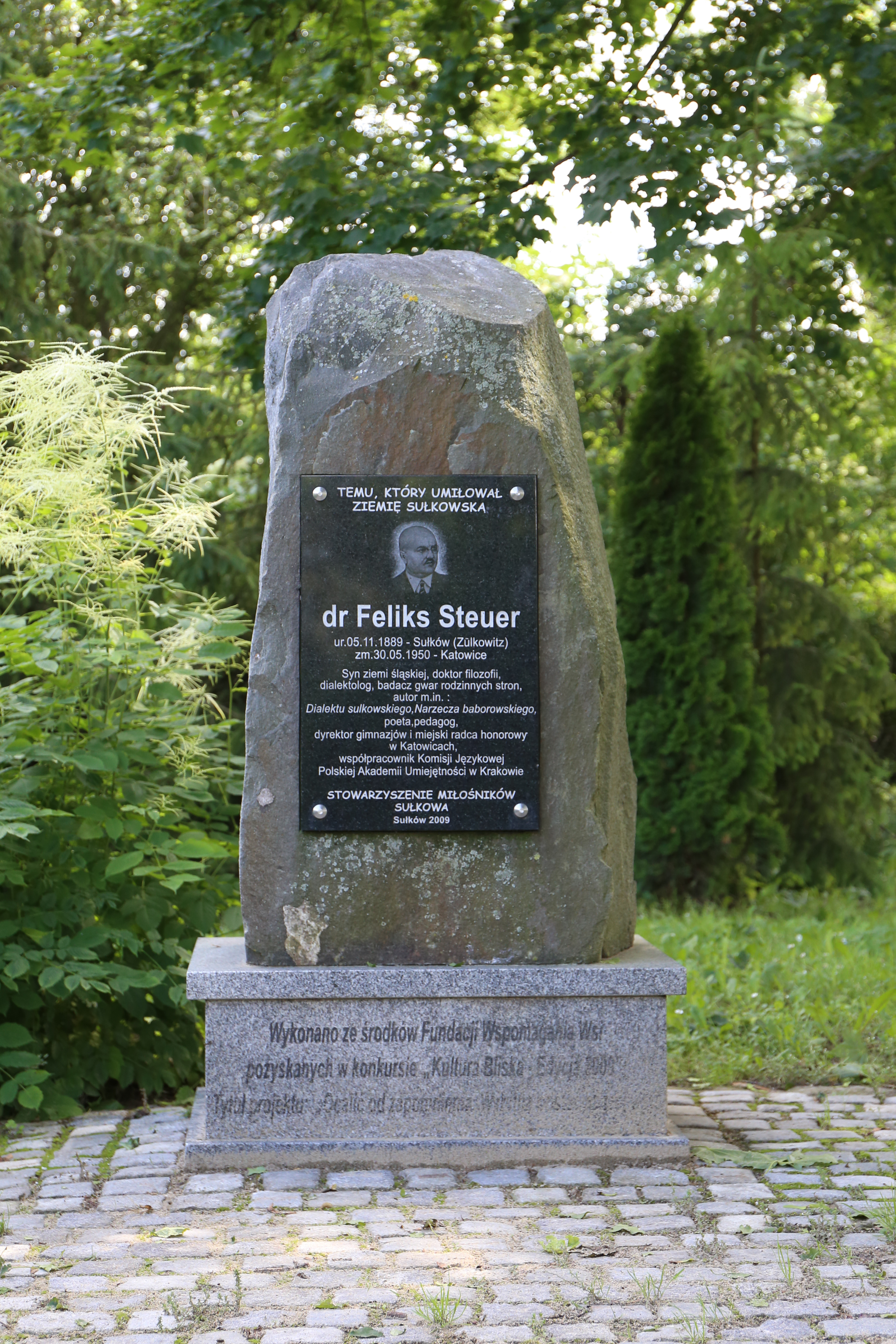 Sułków - wieś w Polsce położona w województwie opolskim, w powiecie głubczyckim, w gminie Baborów.